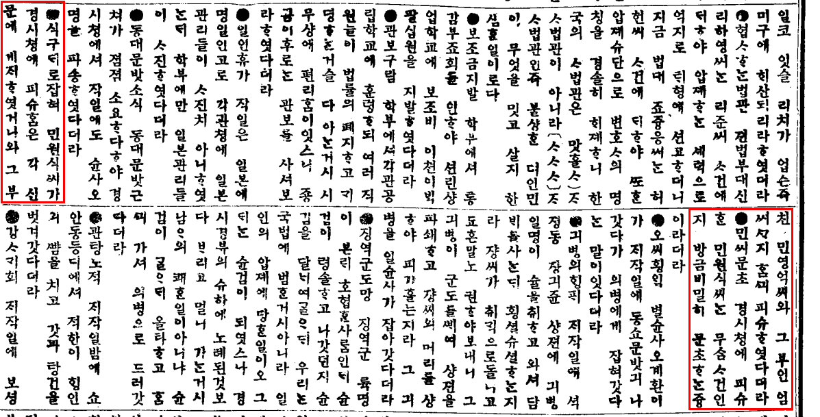 대한매일신보 1908년 1월 31자 기사